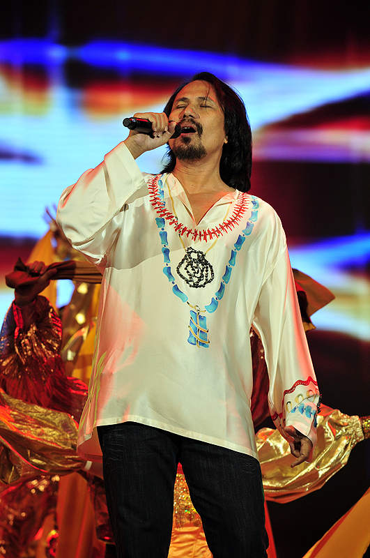 Anugerah Juara Lagu 23